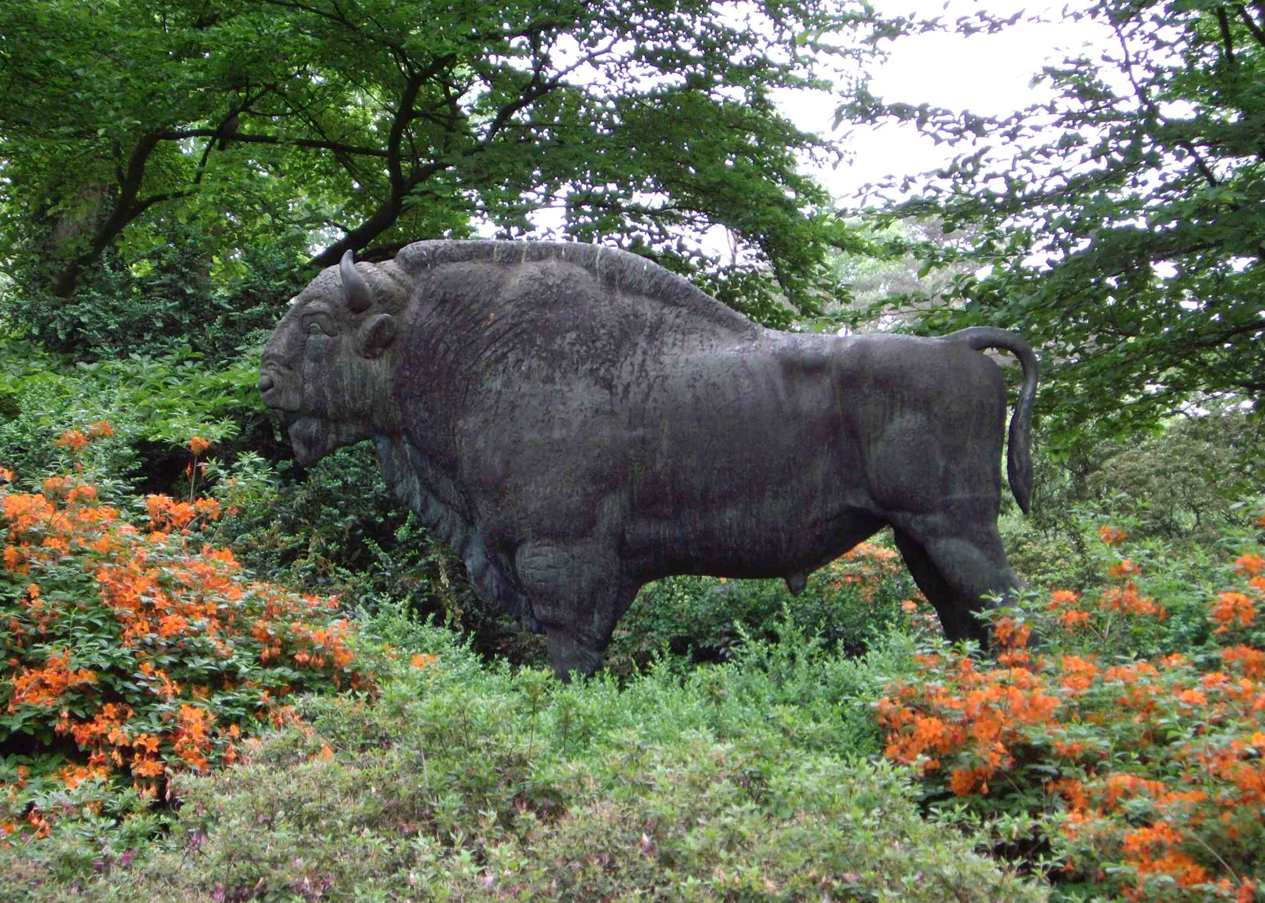 Wisent (Bronze) von Ernst Gorsemann, Weltausstellung 1937 Paris, jetzt Rhododendronpark Bremen